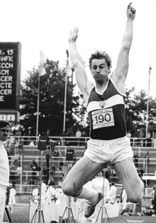 Lutz Dombrowski ADN-ZB Hiekel 27.7.84 Dresden: Leichtathletik-Sportfest Goldenes Oval. Mit erstklassigen 8.50 m gewann Olympiasieger Lutz Dombrowski (SC Karl-Marx-Stadt) die Weitsprungkonkurrenz.